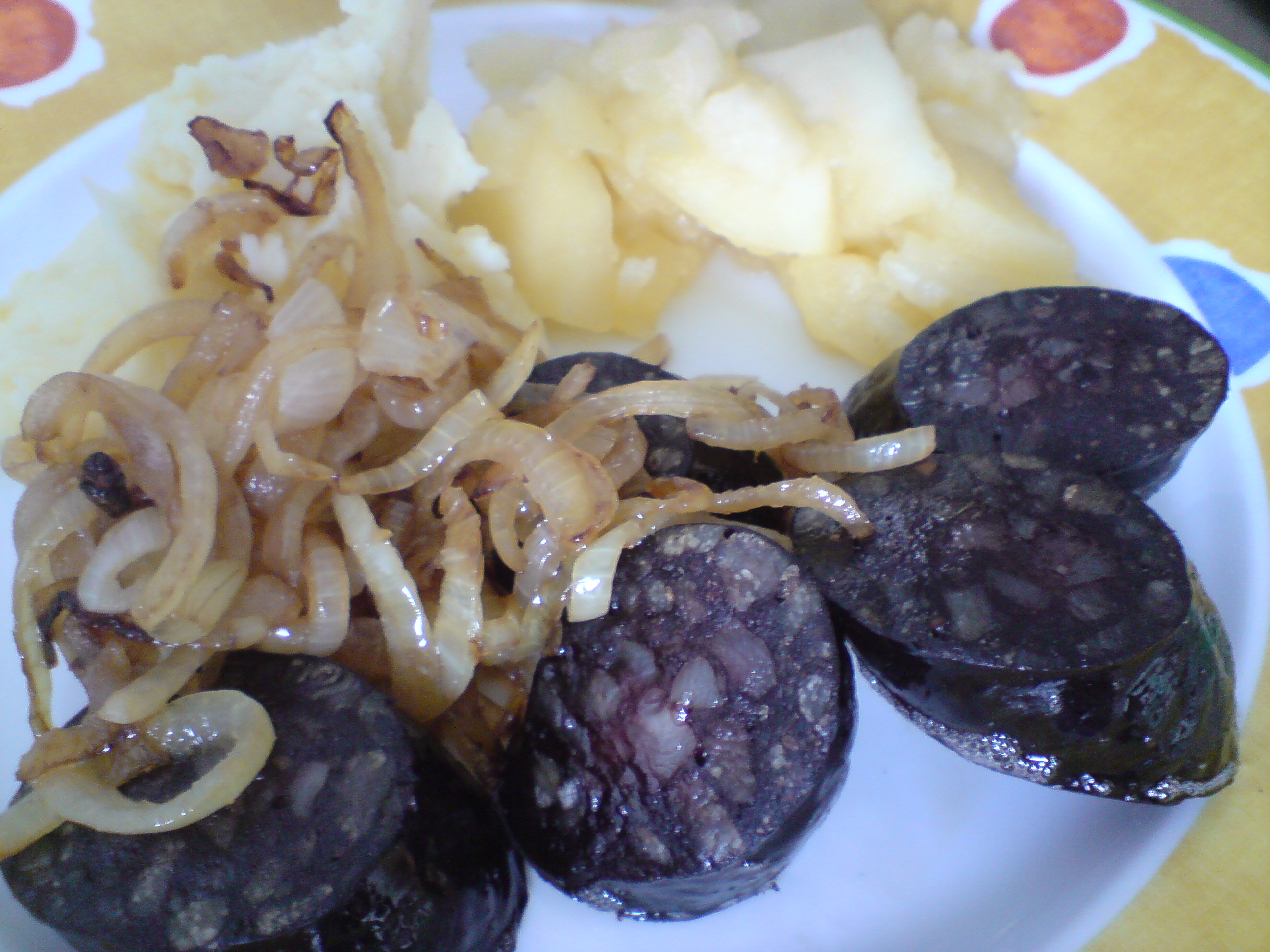 Rheinisches Gericht "Himmel un Ääd" - Kartoffelpürree, gebratene Äpfel, gebratene Zwiebeln und gebratene Blutwurst (Flönz)